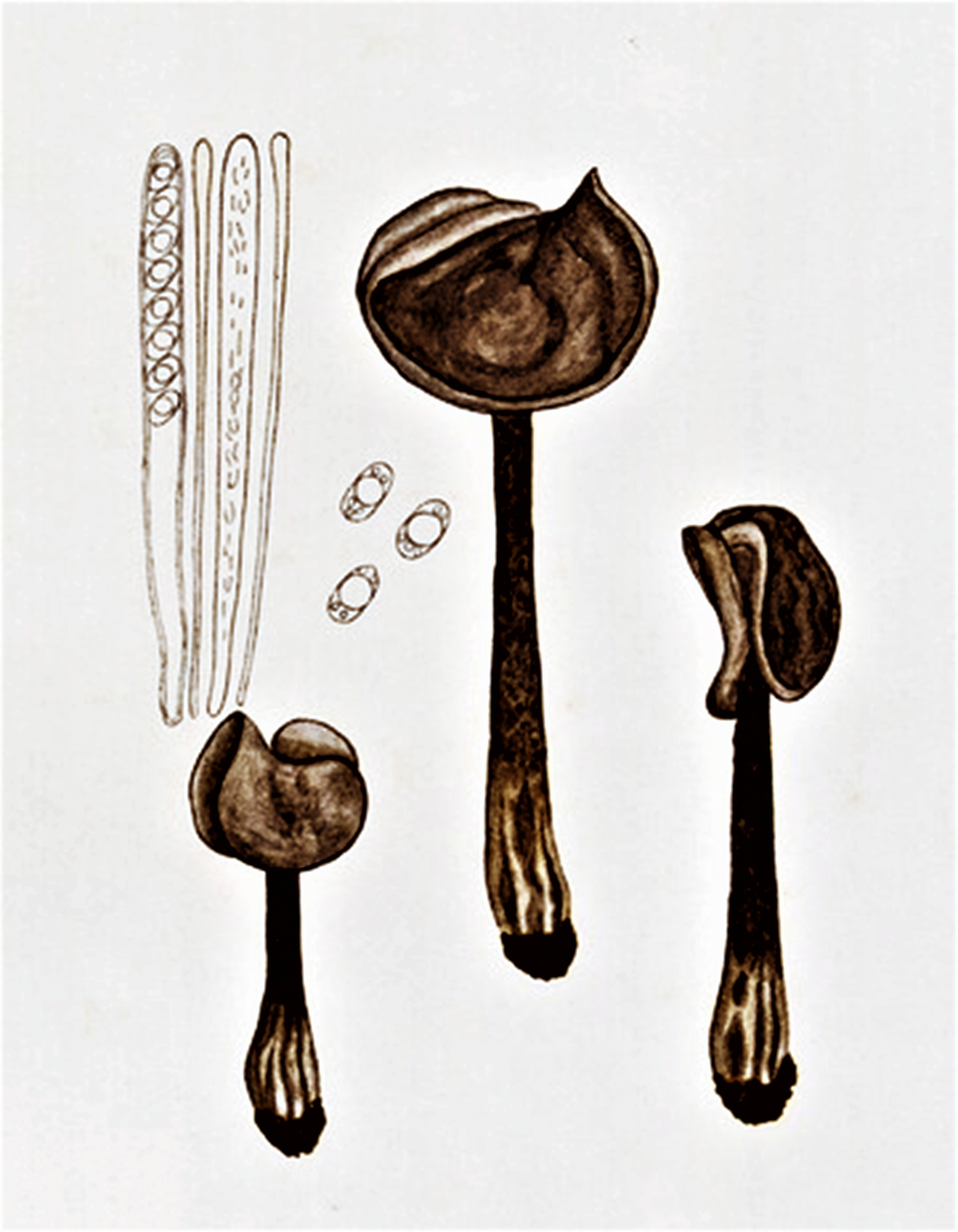 Giacomo Bresadola: Helvella atra J.König (1770)